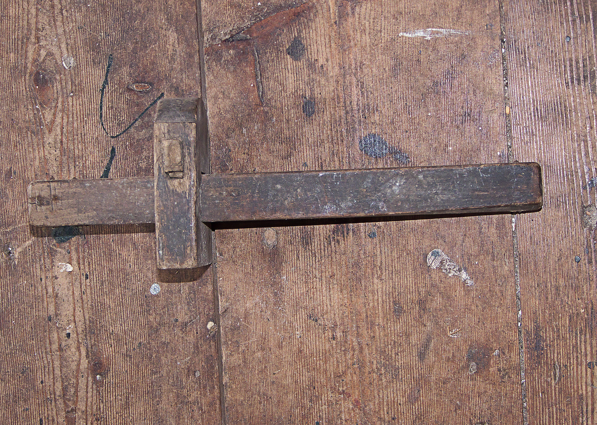 kruishout